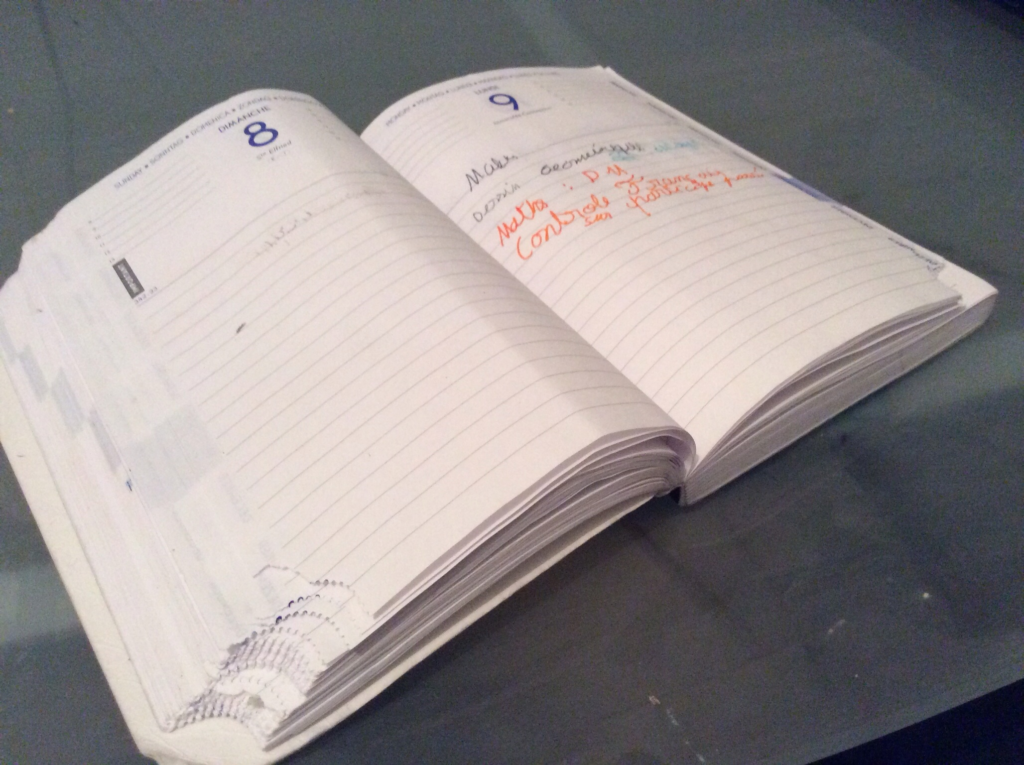 Un agenda